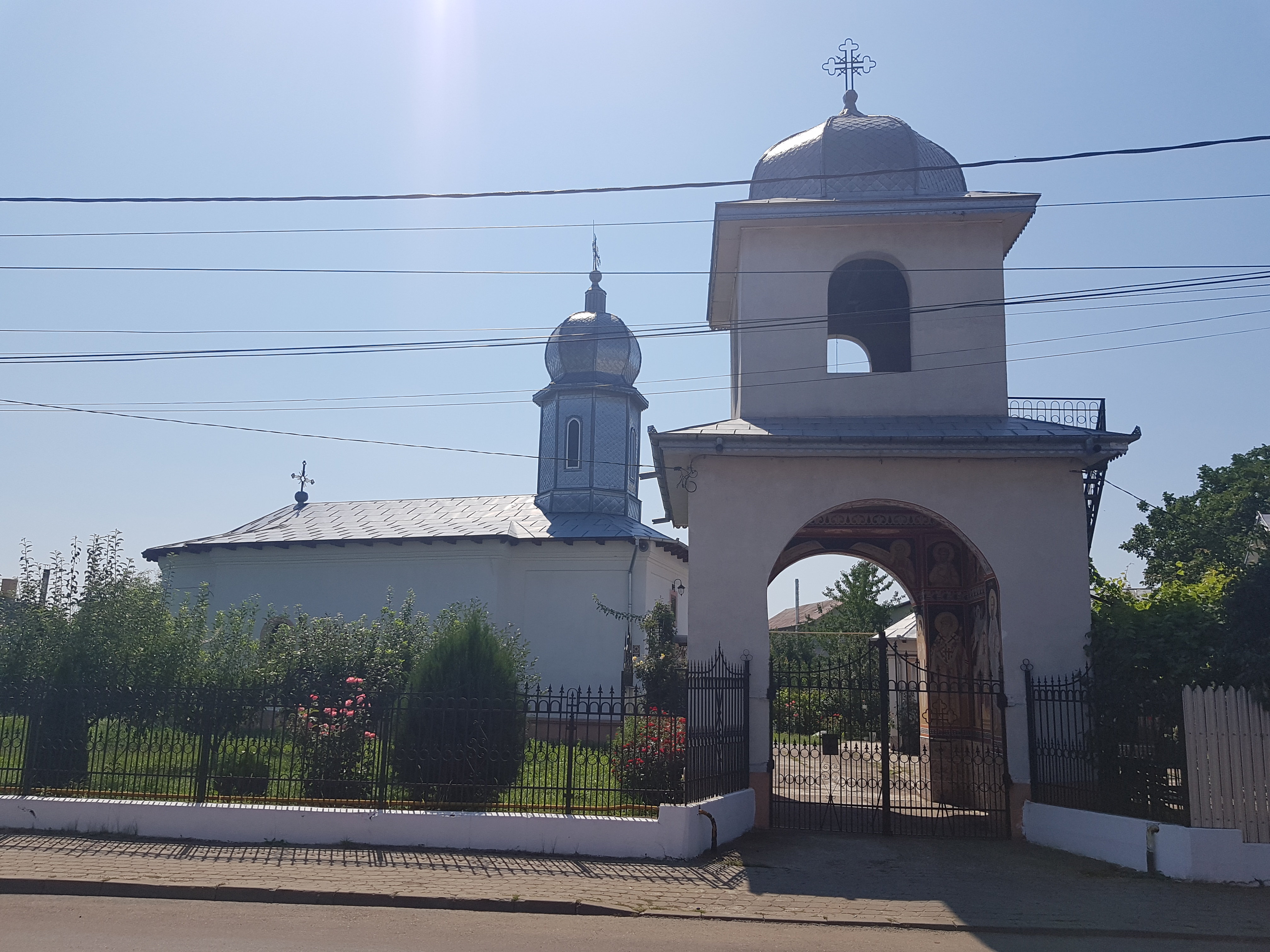 Biserica „Sf. Spiridon”